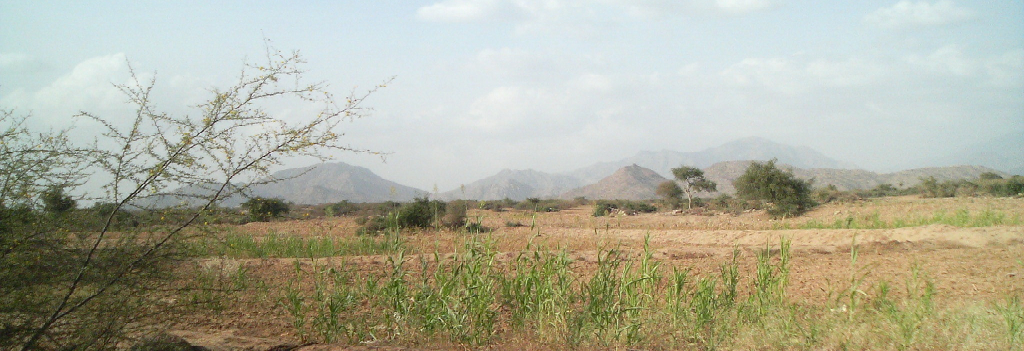 لقطة بانورامية لمرتفعات محافظة الحرث بمنطقة جازان - السعودية